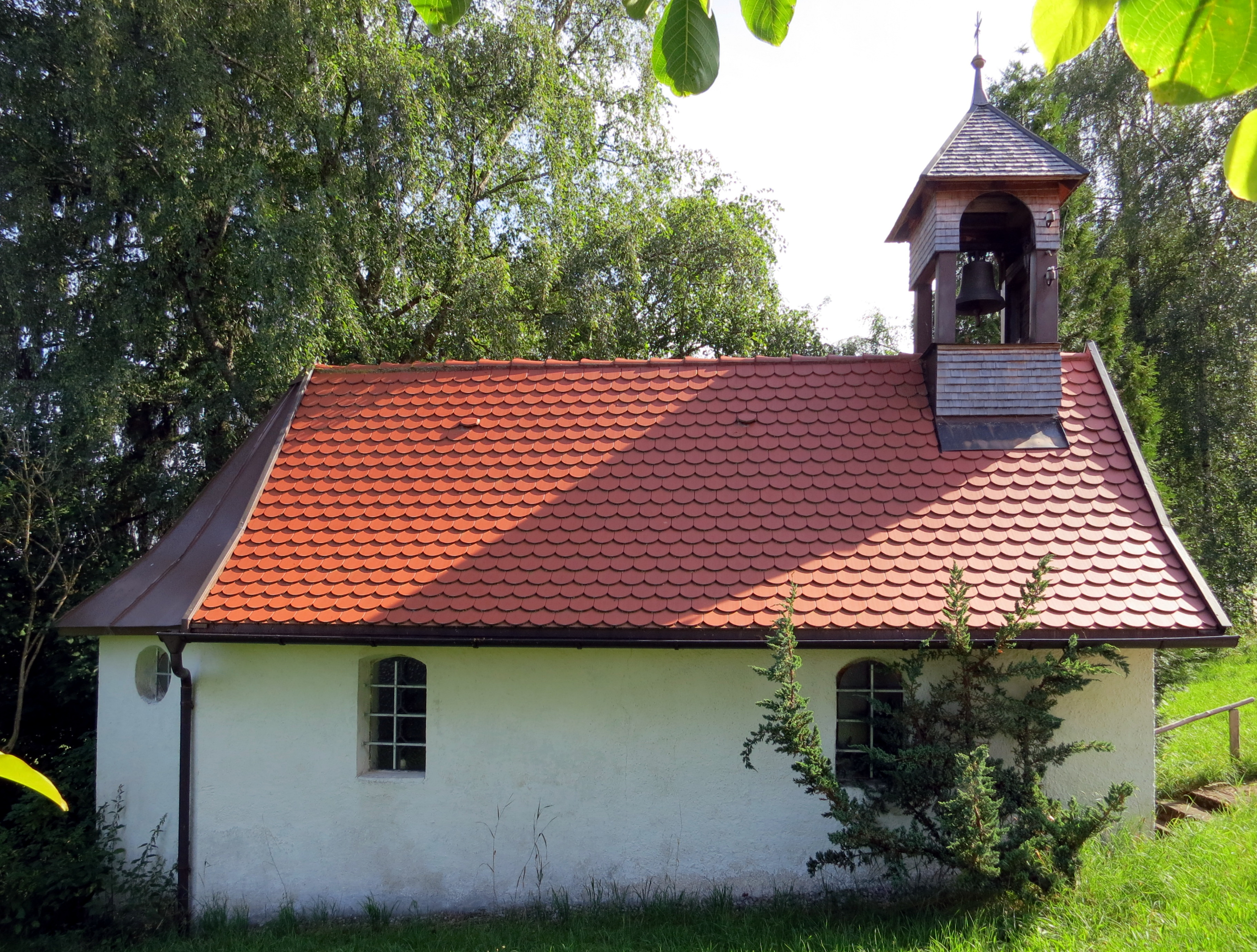 Außenansicht der Hofkapelle in Aichbaindt, Gemeinde Wiggensbach